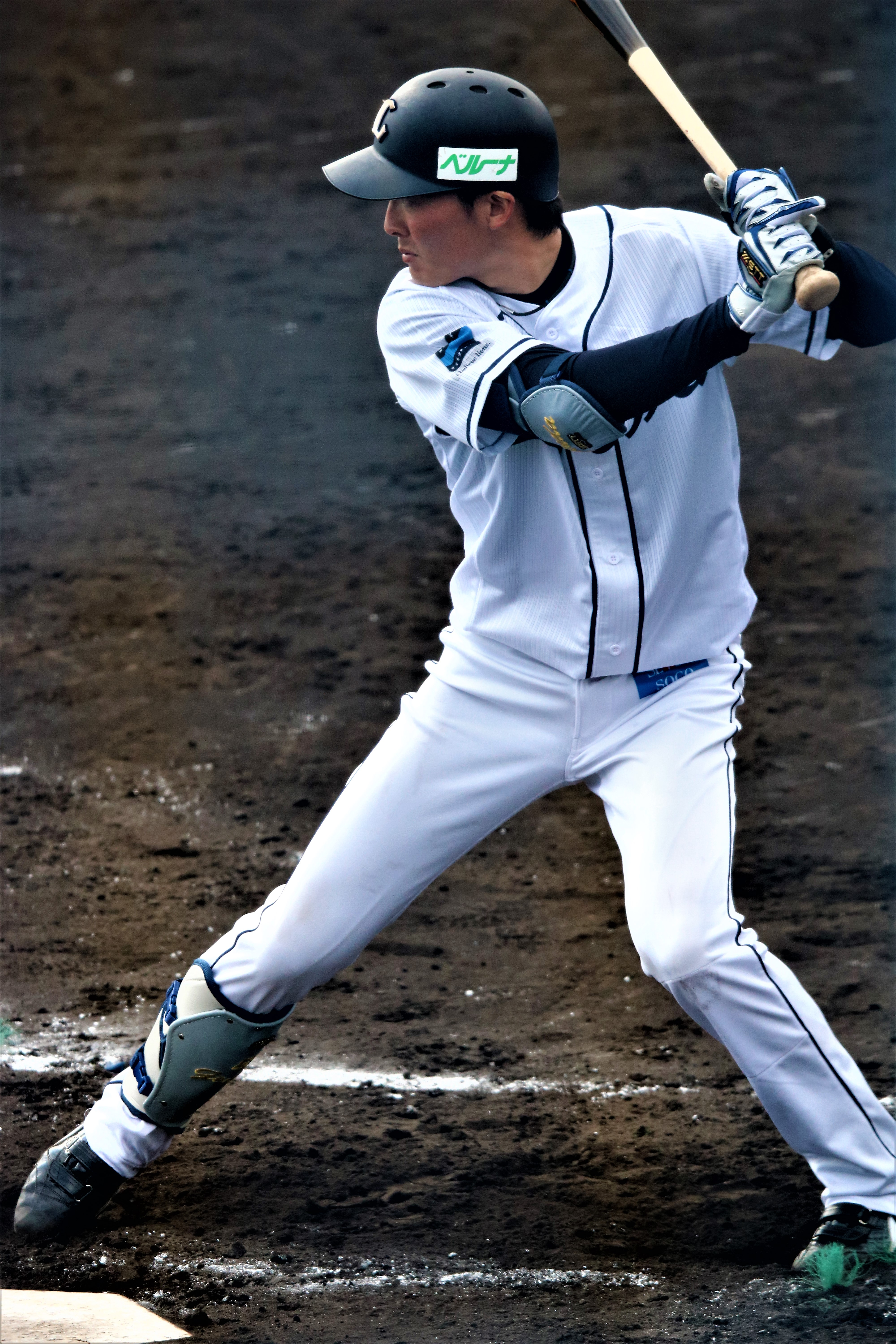 2018/2/9 宮崎・南郷キャンプ